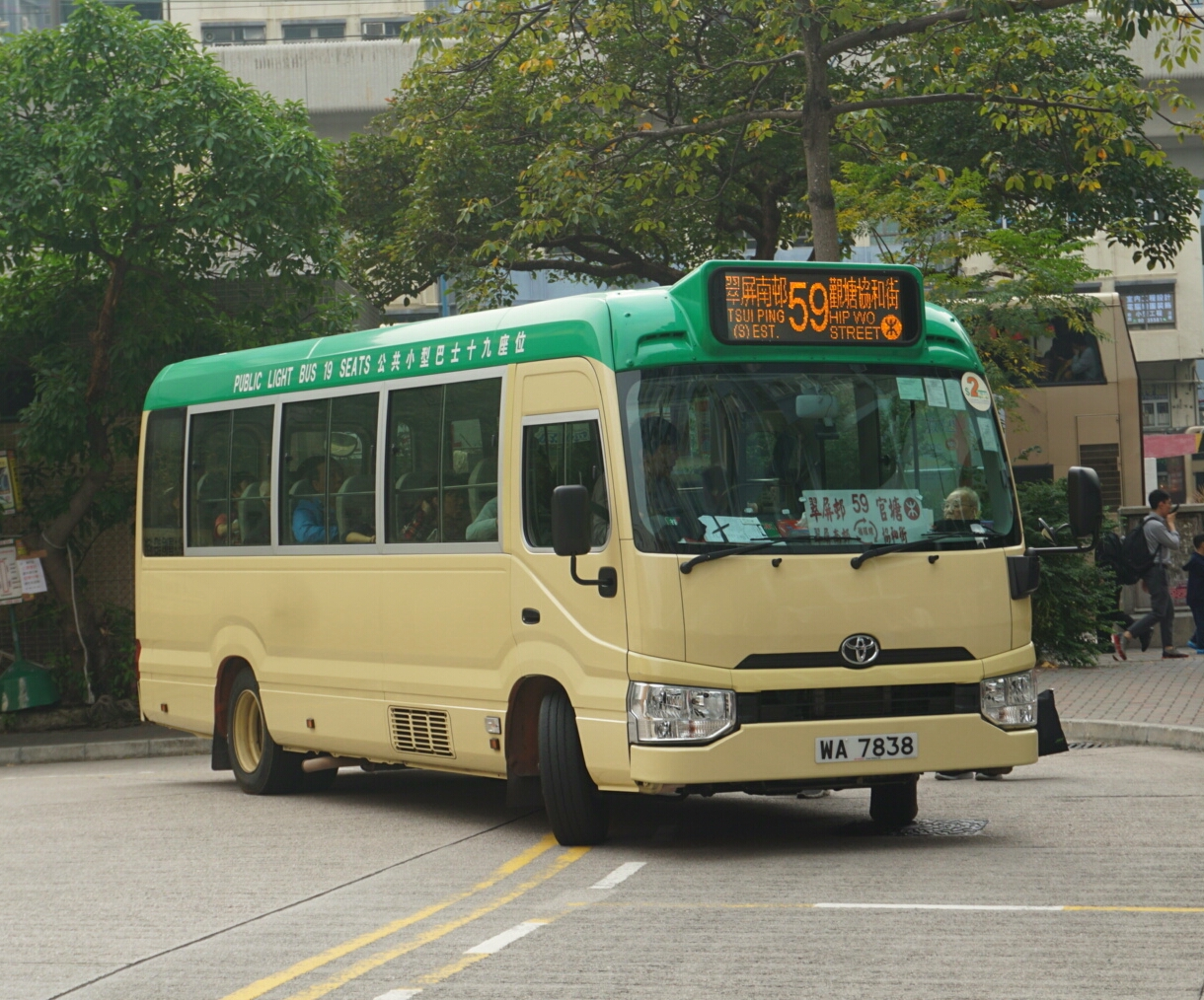 中文（香港）: 九龍區專線小巴59線，剛到達觀塘站